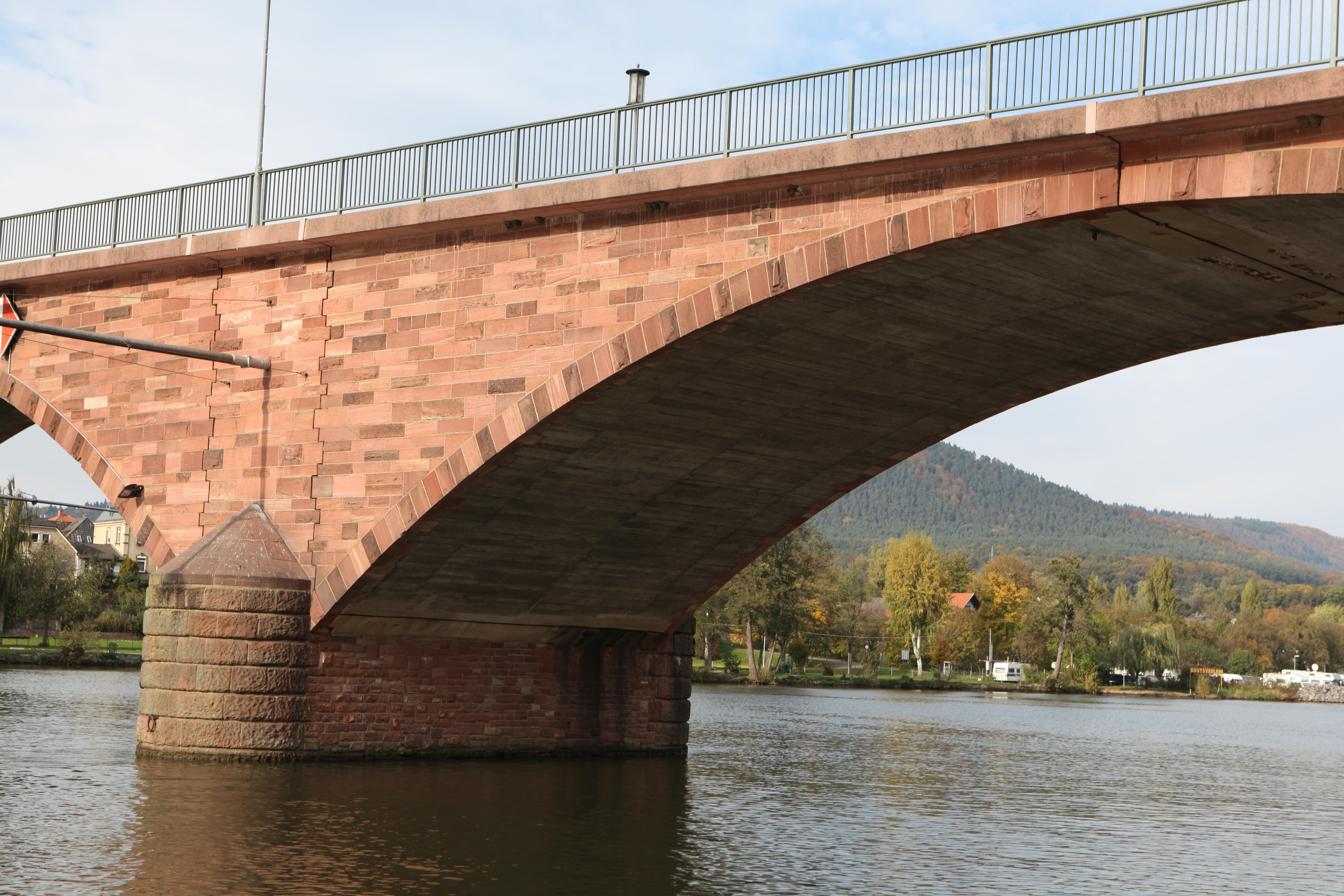 Mainbrücke Miltenberg